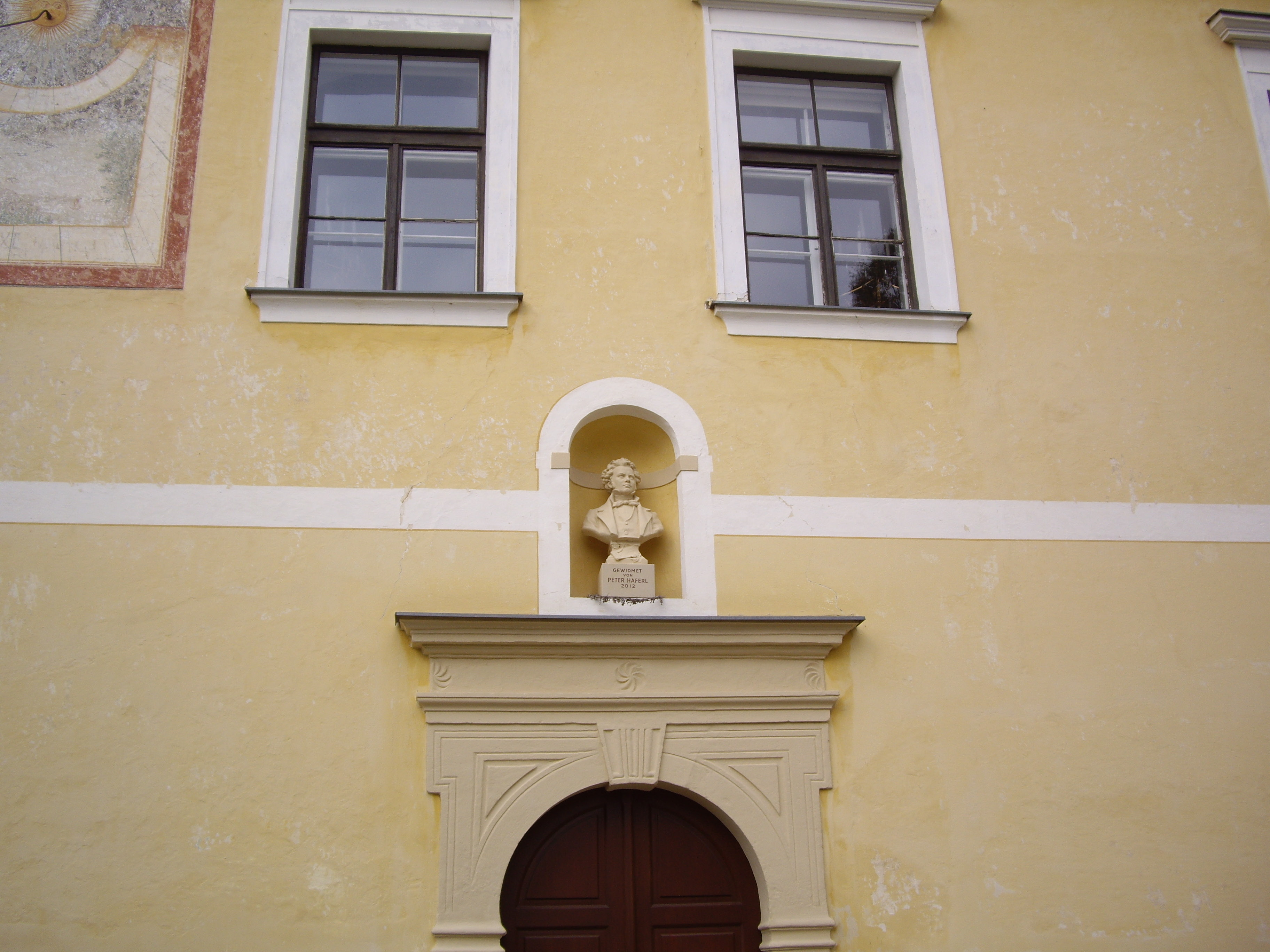 La Kastelo Atzenbrugg kun busto de Franz Schubert